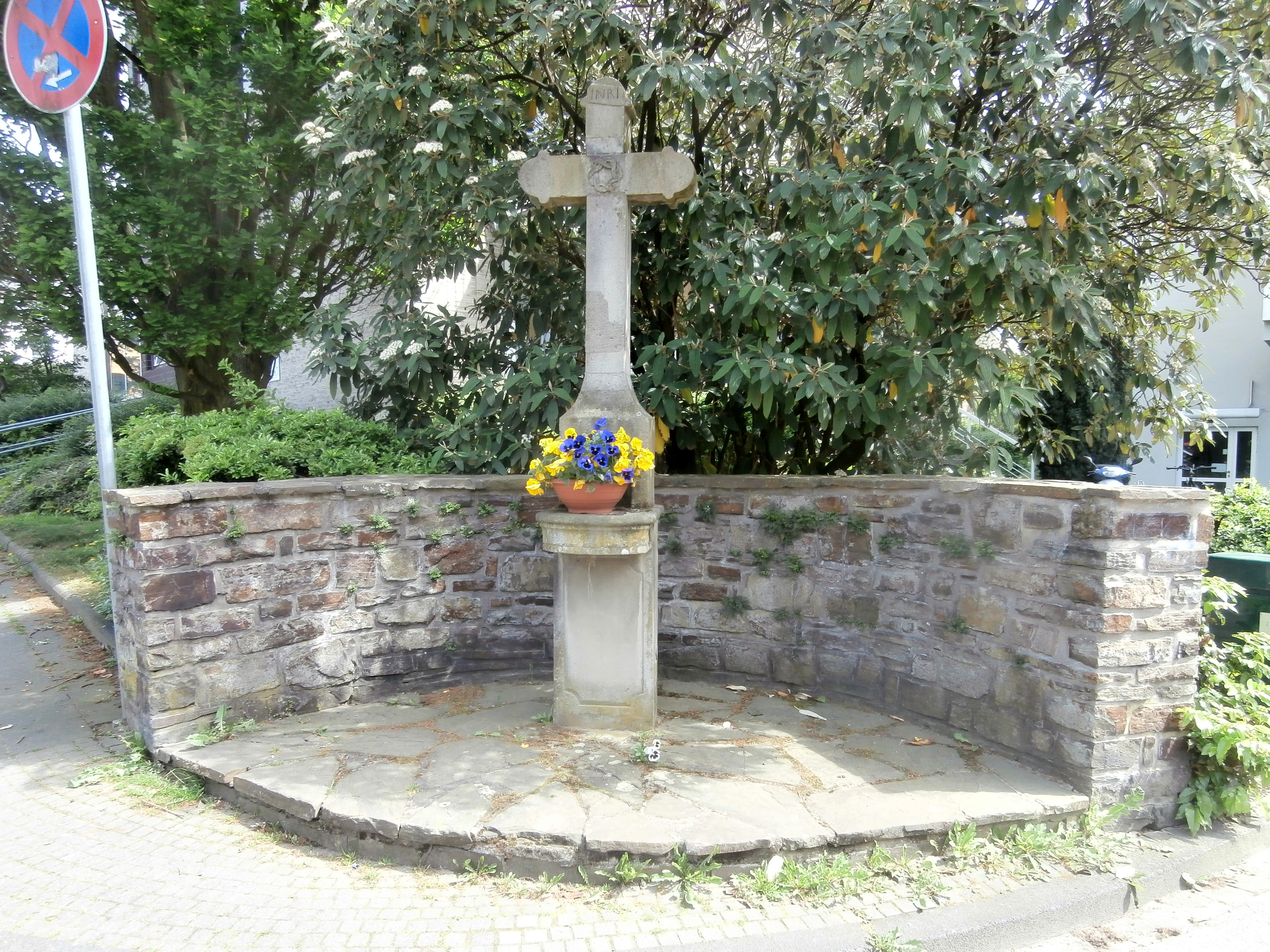 Denkmalgeschütztes Wegekreuz (aufgestellt zur Erinnerung an die ehemals hier befindliche Sakramentskapelle Domus Dei), Ecke Schülgenstraße/Göttchesplatz, Bad Honnef